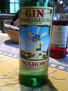 Bouteille de Gin de Minorque (Mahon), Marque : Gin Xoriguer